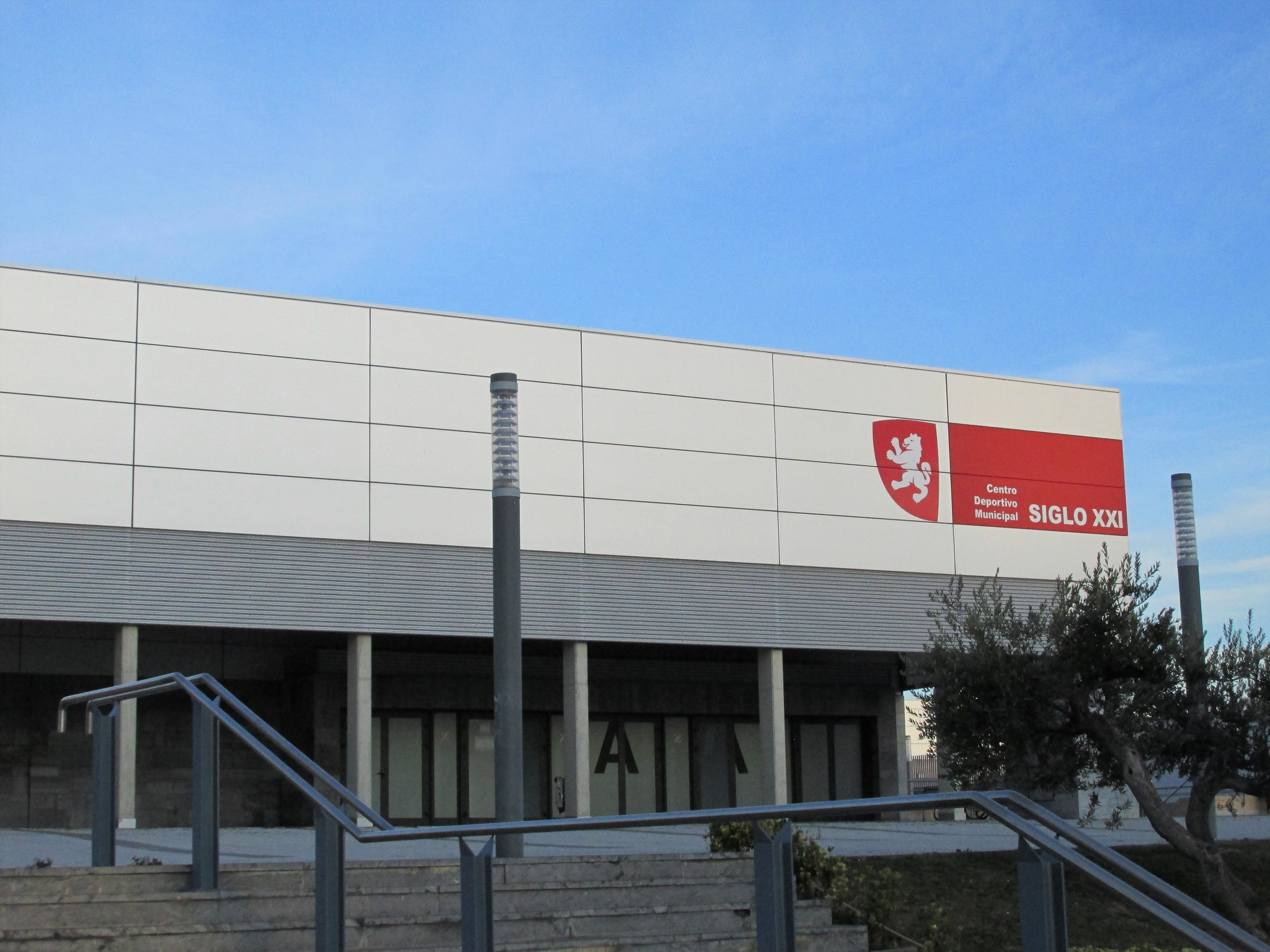 Pabellon Siglo XXI de Zaragoza.